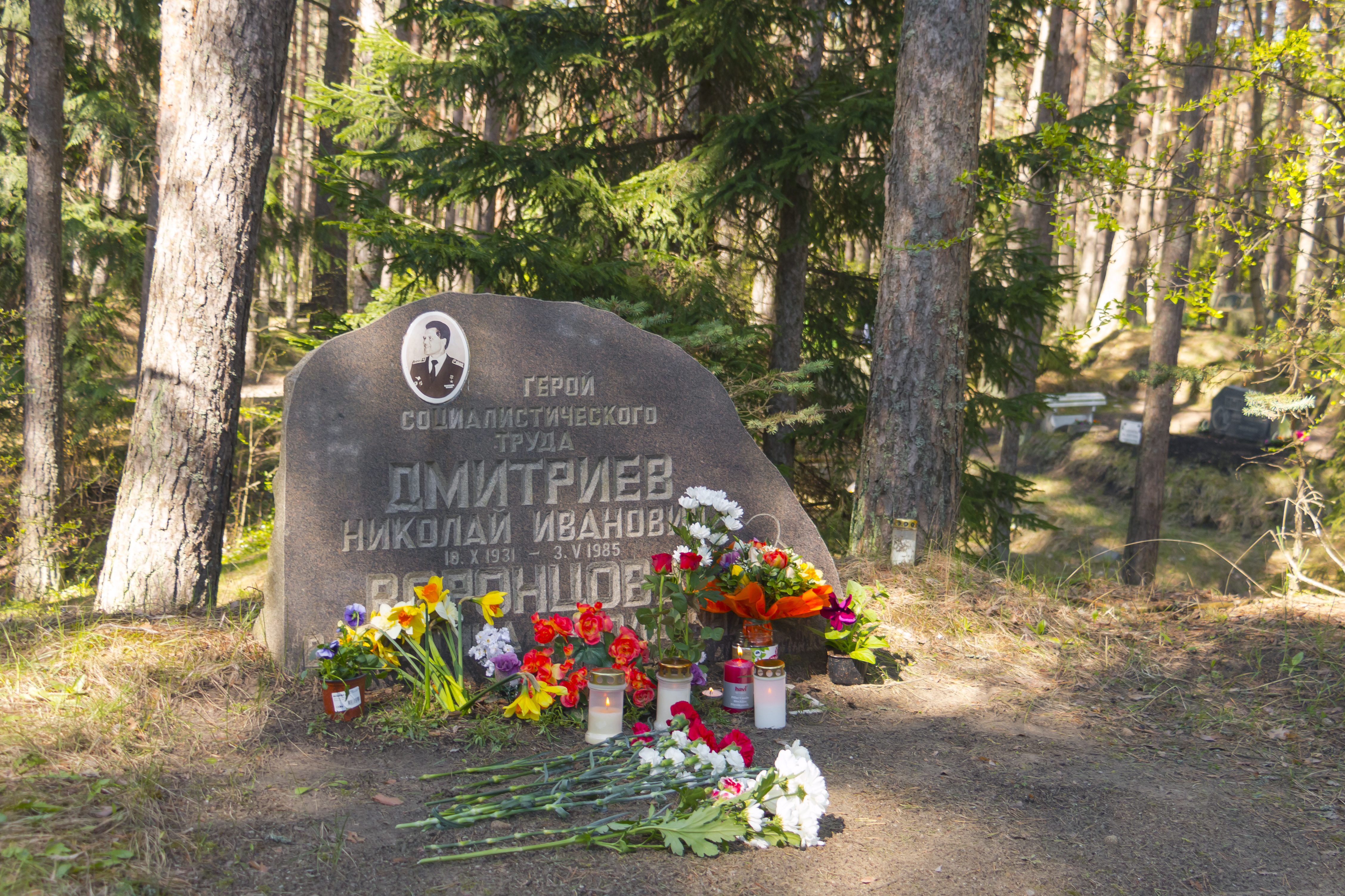 Могила Николая Иванович Дмитриева.